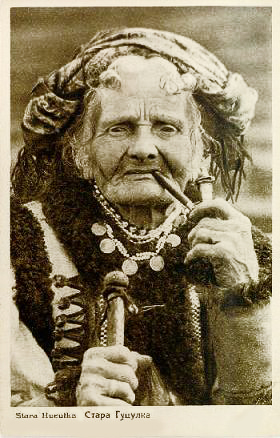 Старая гуцулка